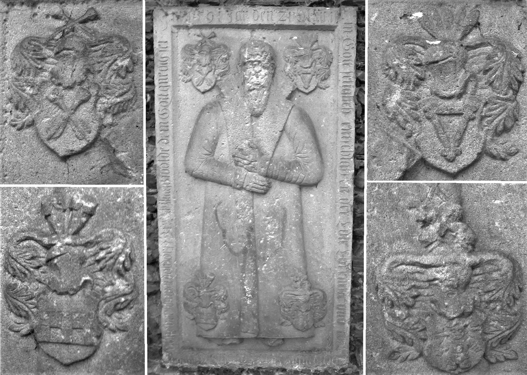 Bożków. Płyta z herbami